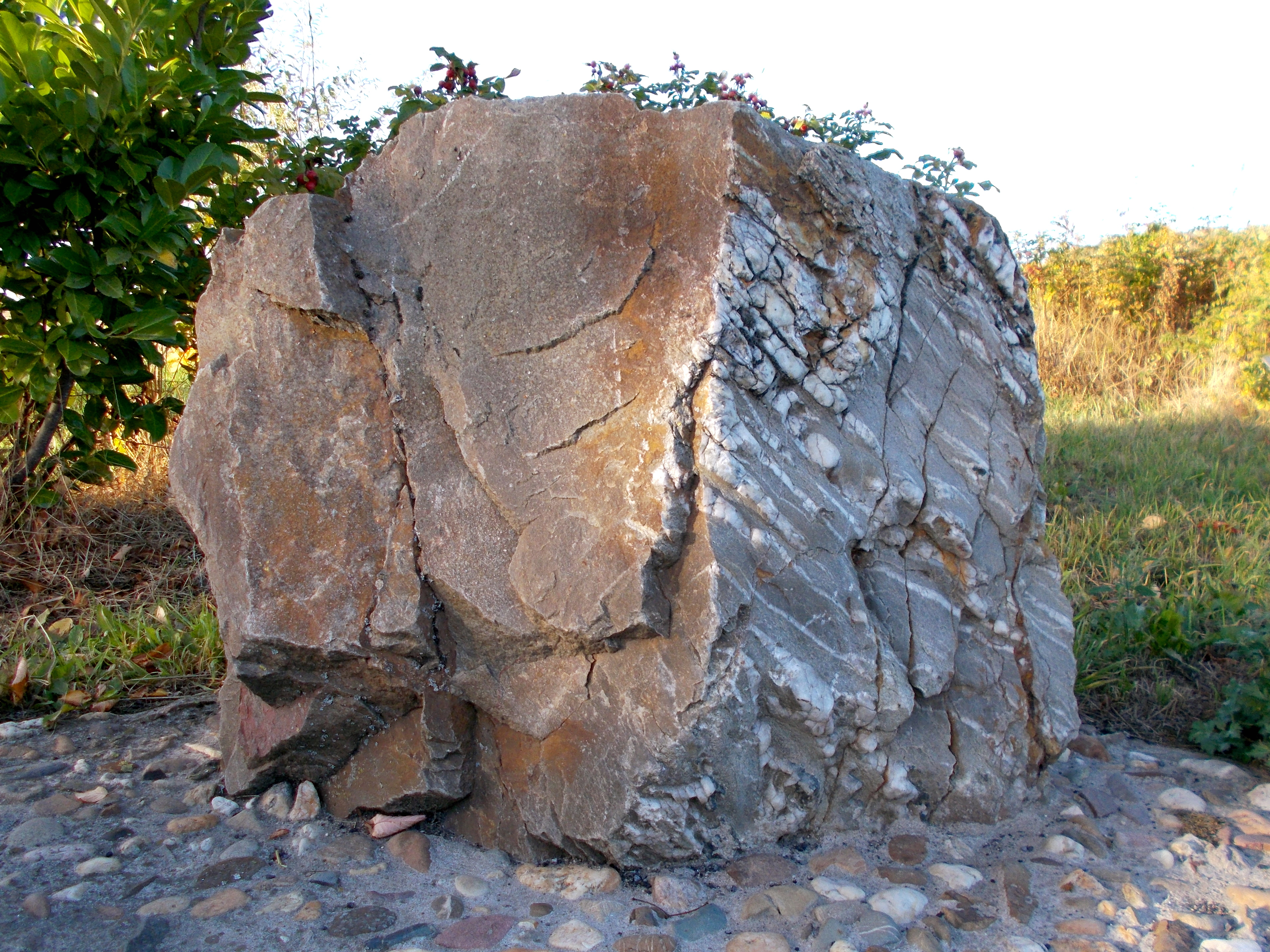 Findlingsweg Sonsbeck Station 9: Grauwacke